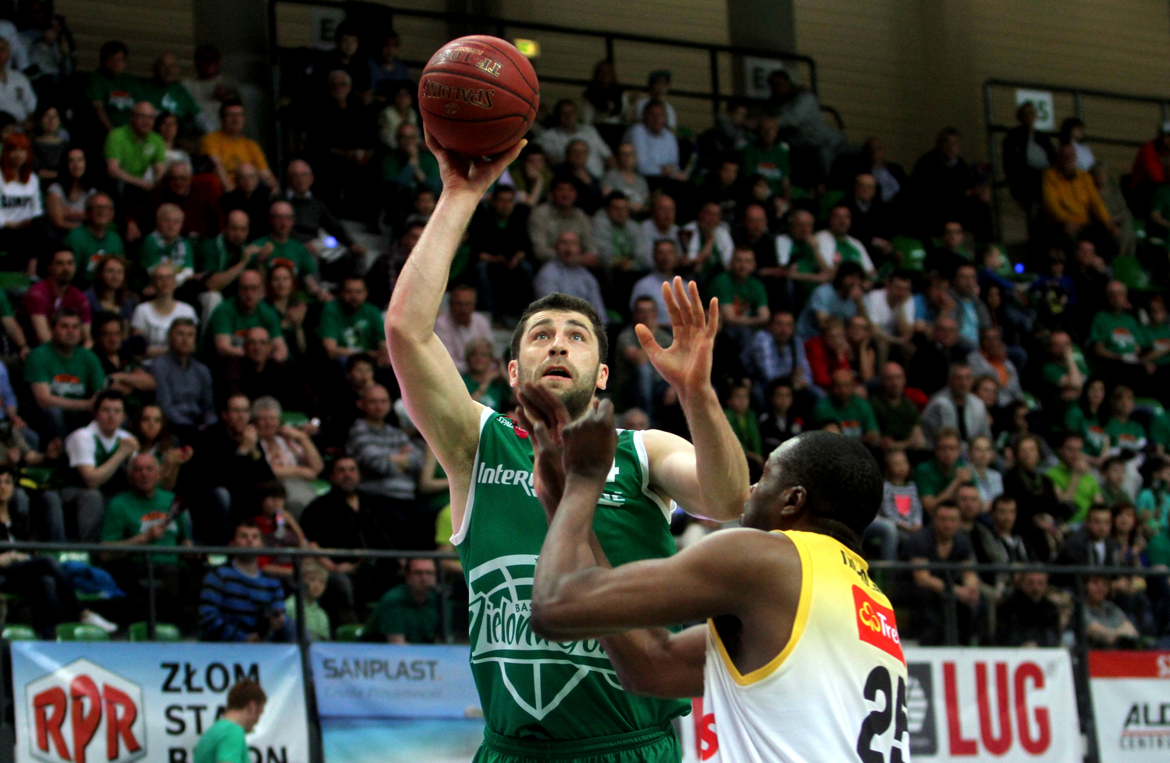 Adam Hrycaniuk Stelmet Zielona Góra